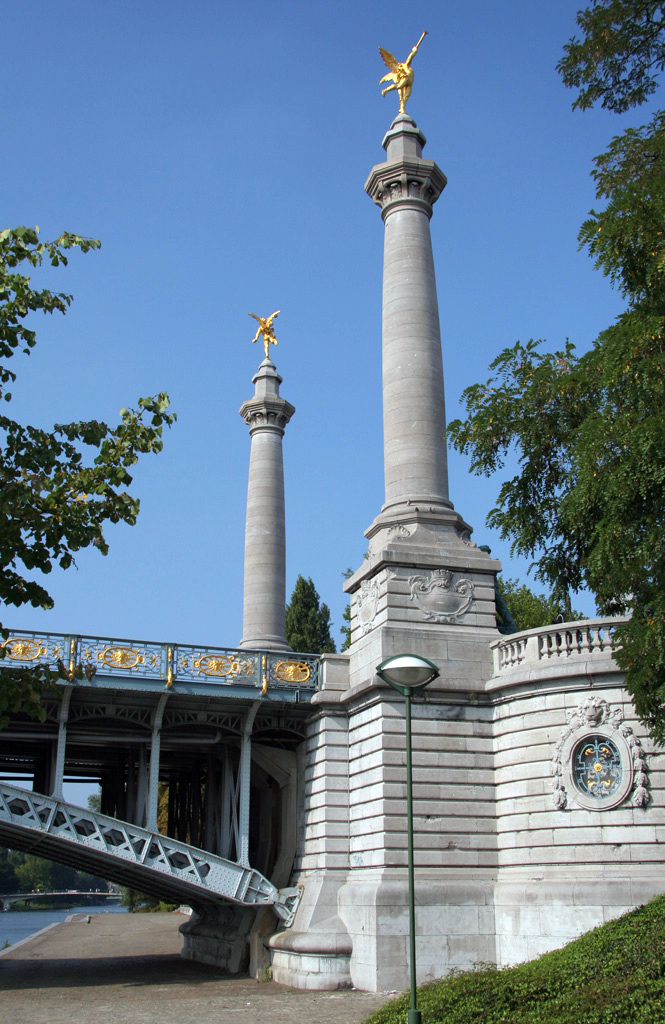 Pont de Fragnée à Liège Photo : Jacques Renier